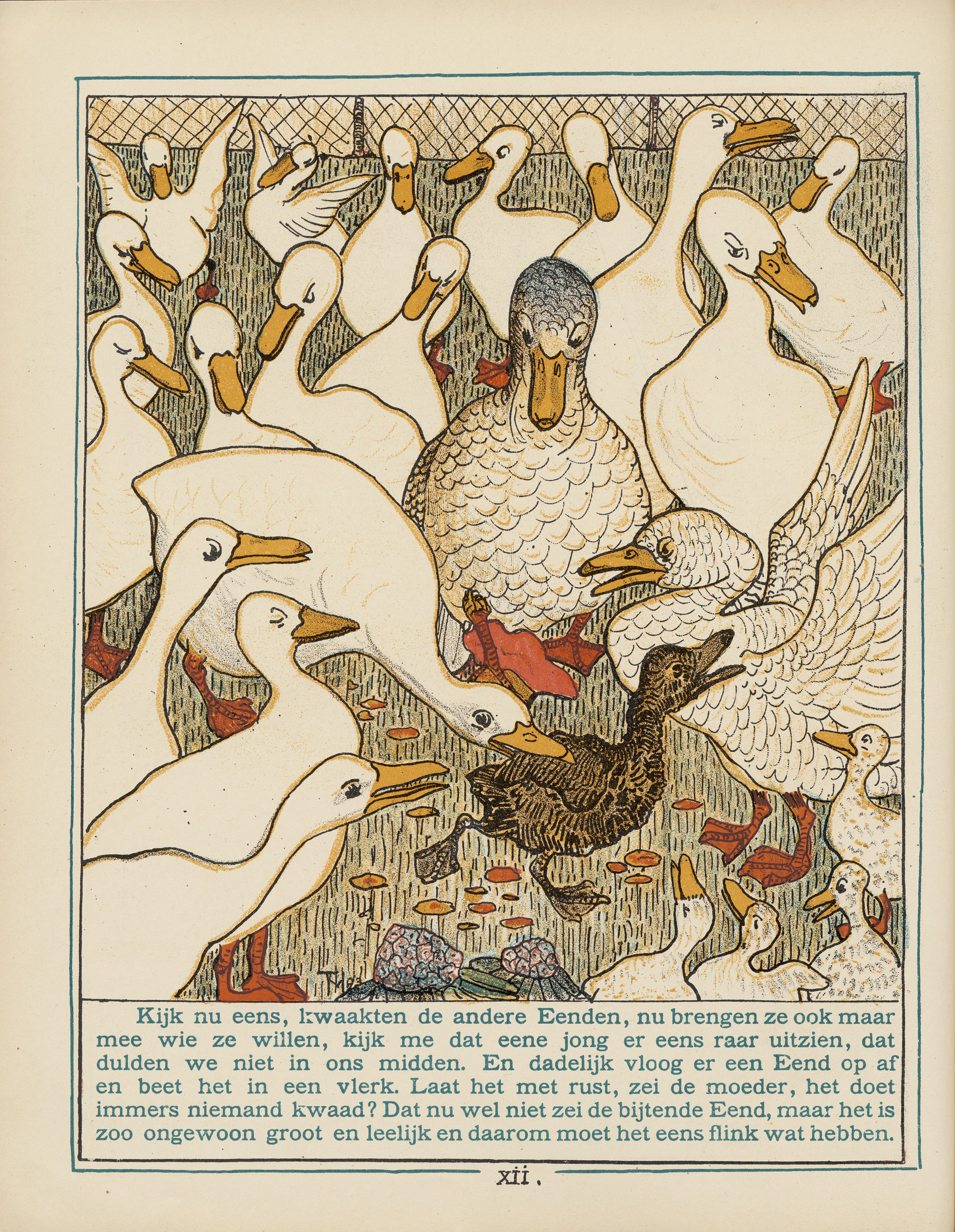 Boekillustratie. Het leelijke jonge eendje : naar het sprookje / van H. C. Andersen ; geteekend en gelithographeerd door T. van Hoytema. - Amsterdam : C.M. van Gogh, 1893, pag. XII.